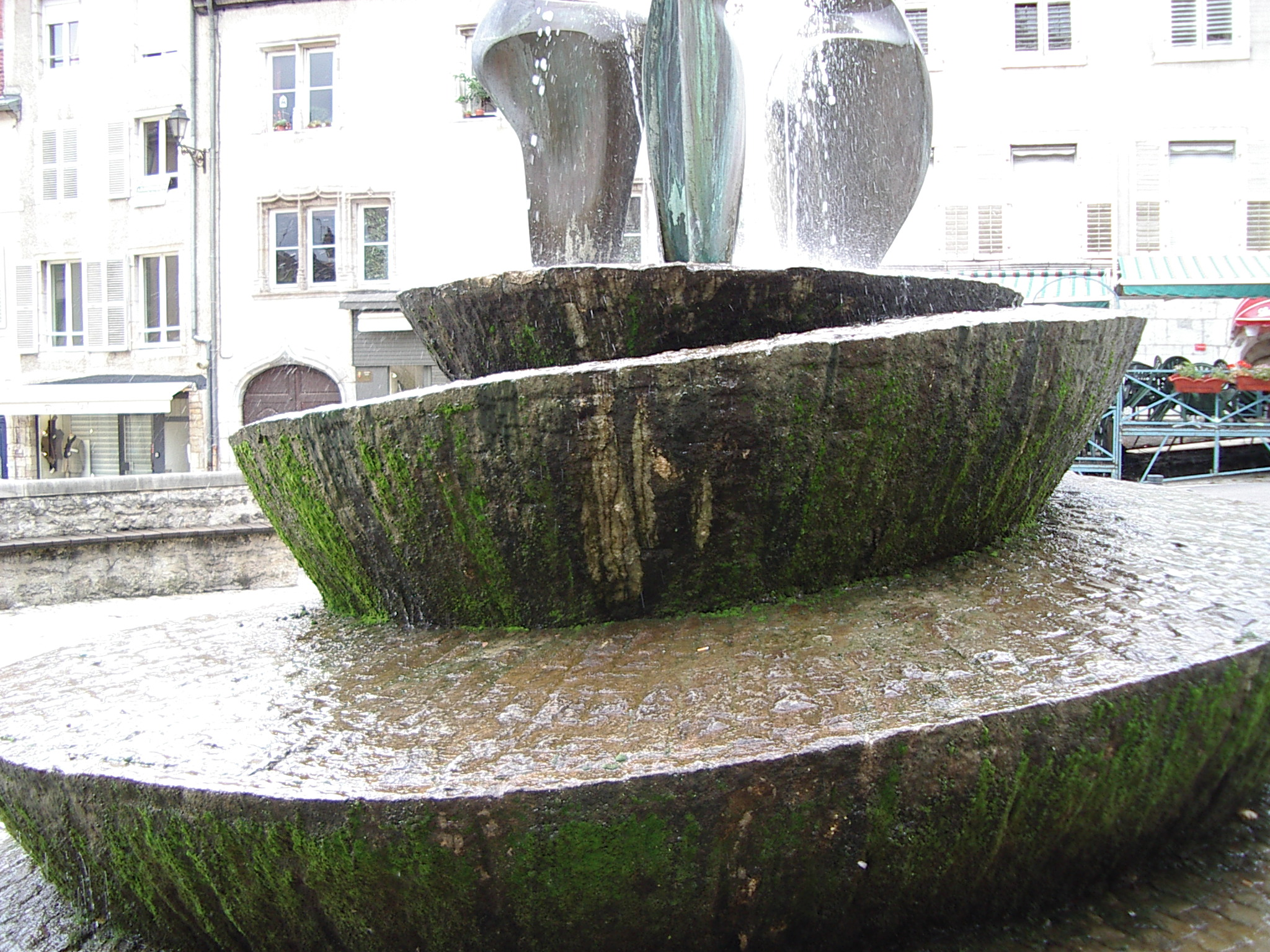 Vesoul Fontaine